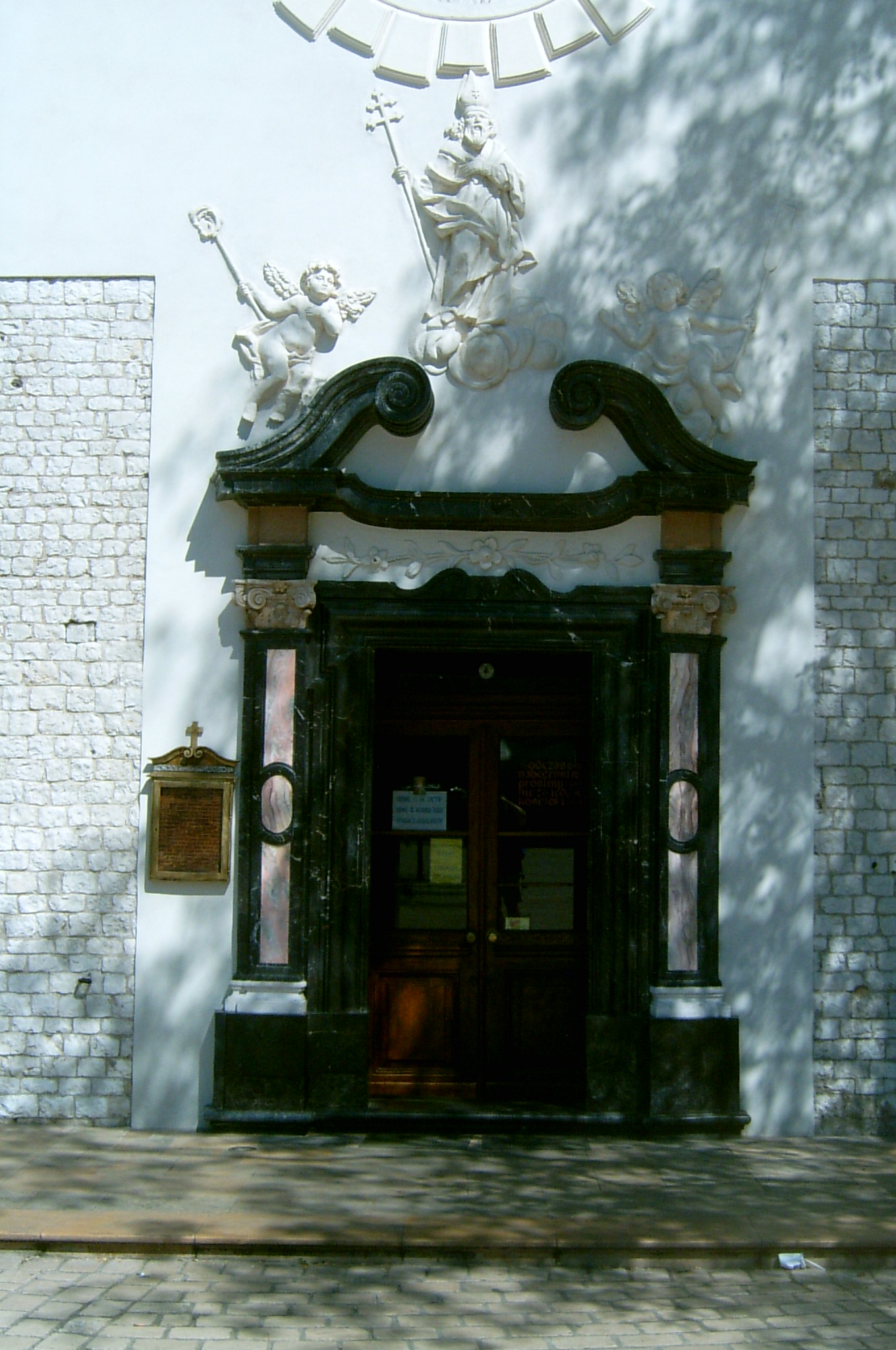 Kraków, Poland